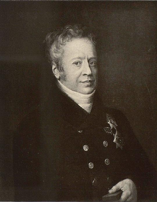 Граф Григорий Александрович Строганов (1770-1857)